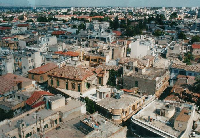 This is Nicosia, the capital of Cyprus seen from top of the woolworth building, located in the city's old town.